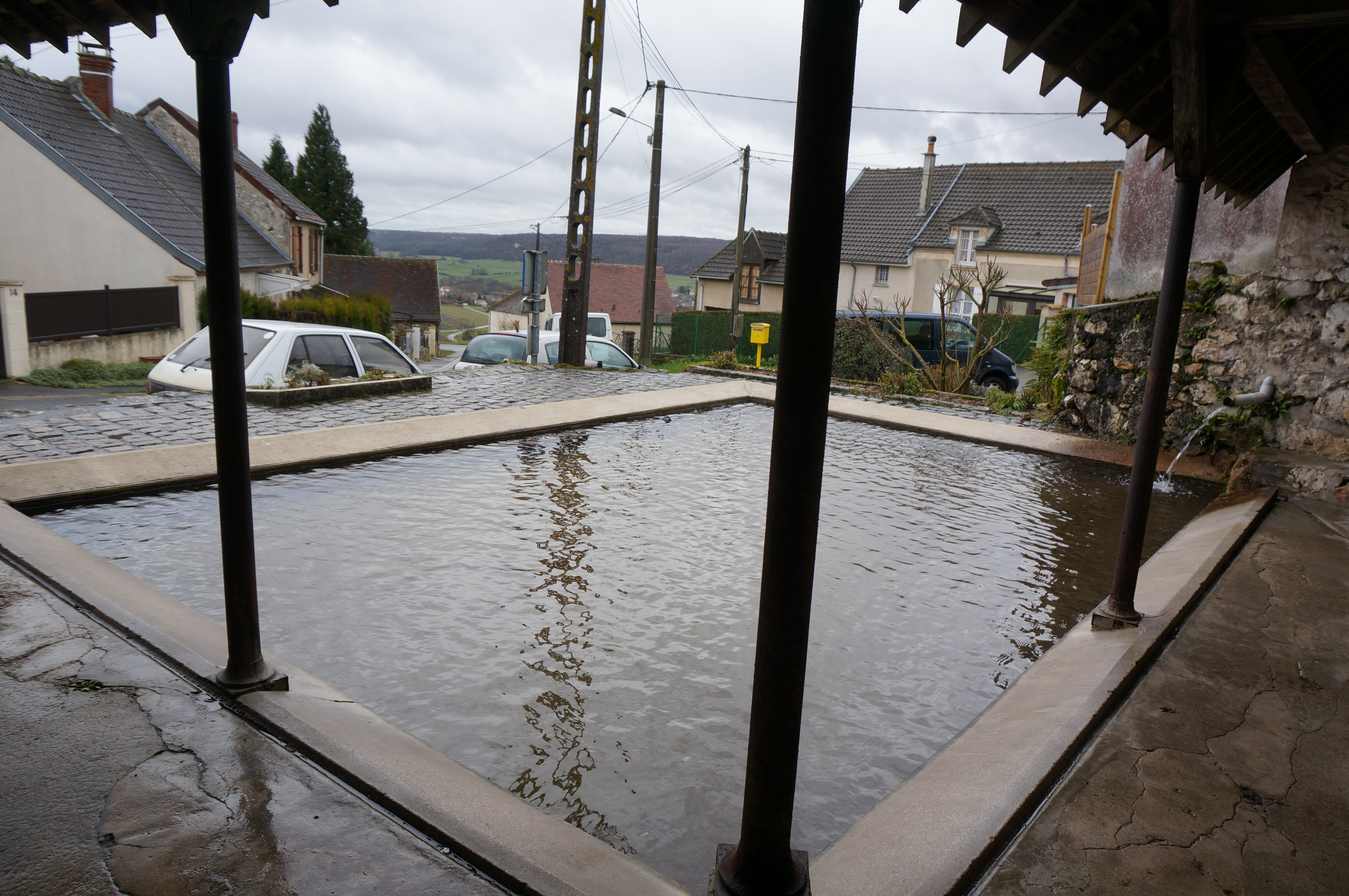 à Le Breuil (Marne).